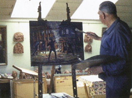 Johan Ahlbäck i sin ateljé omkring 1960